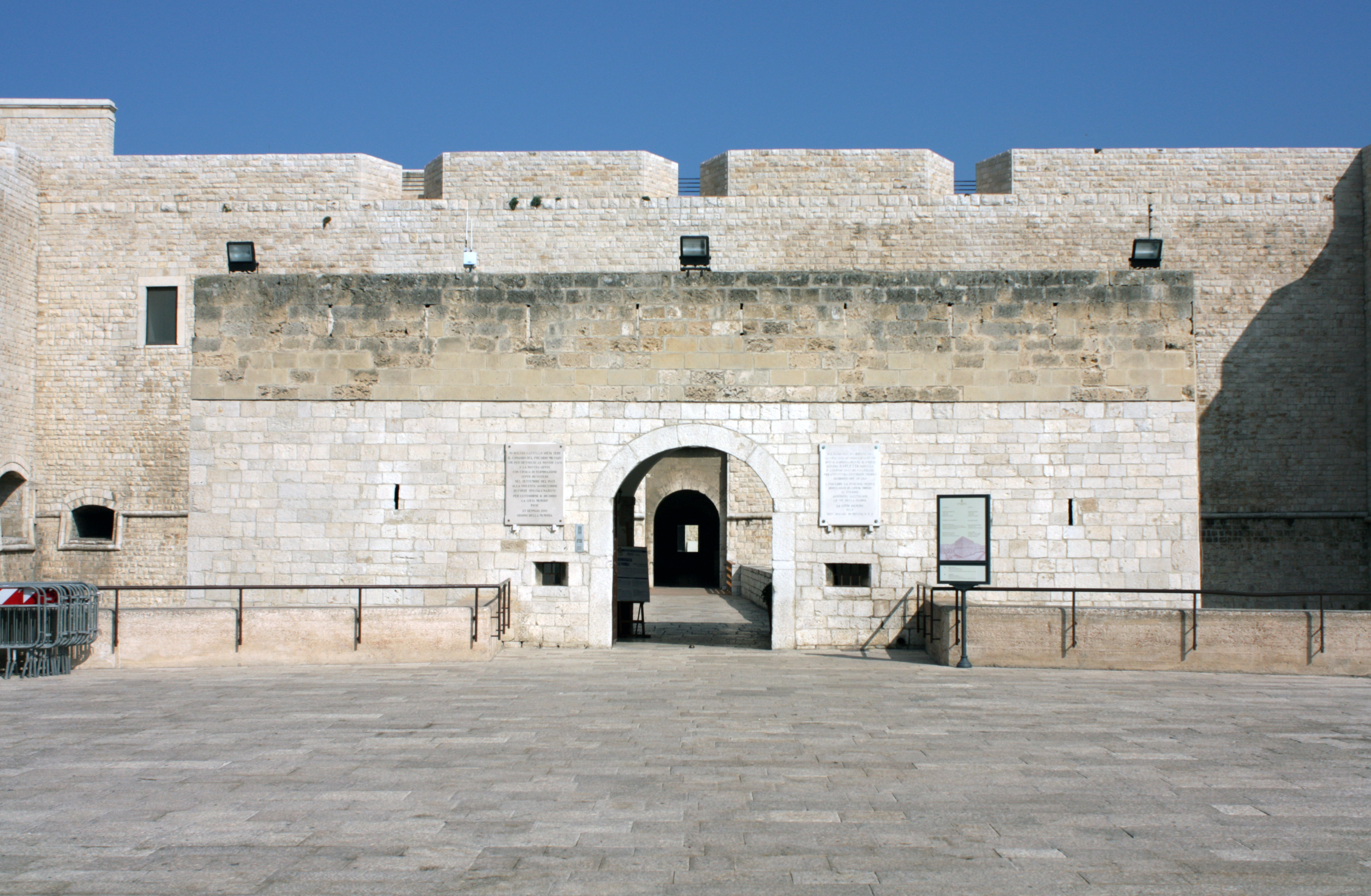 Immagine del rivellino del castello di Barletta